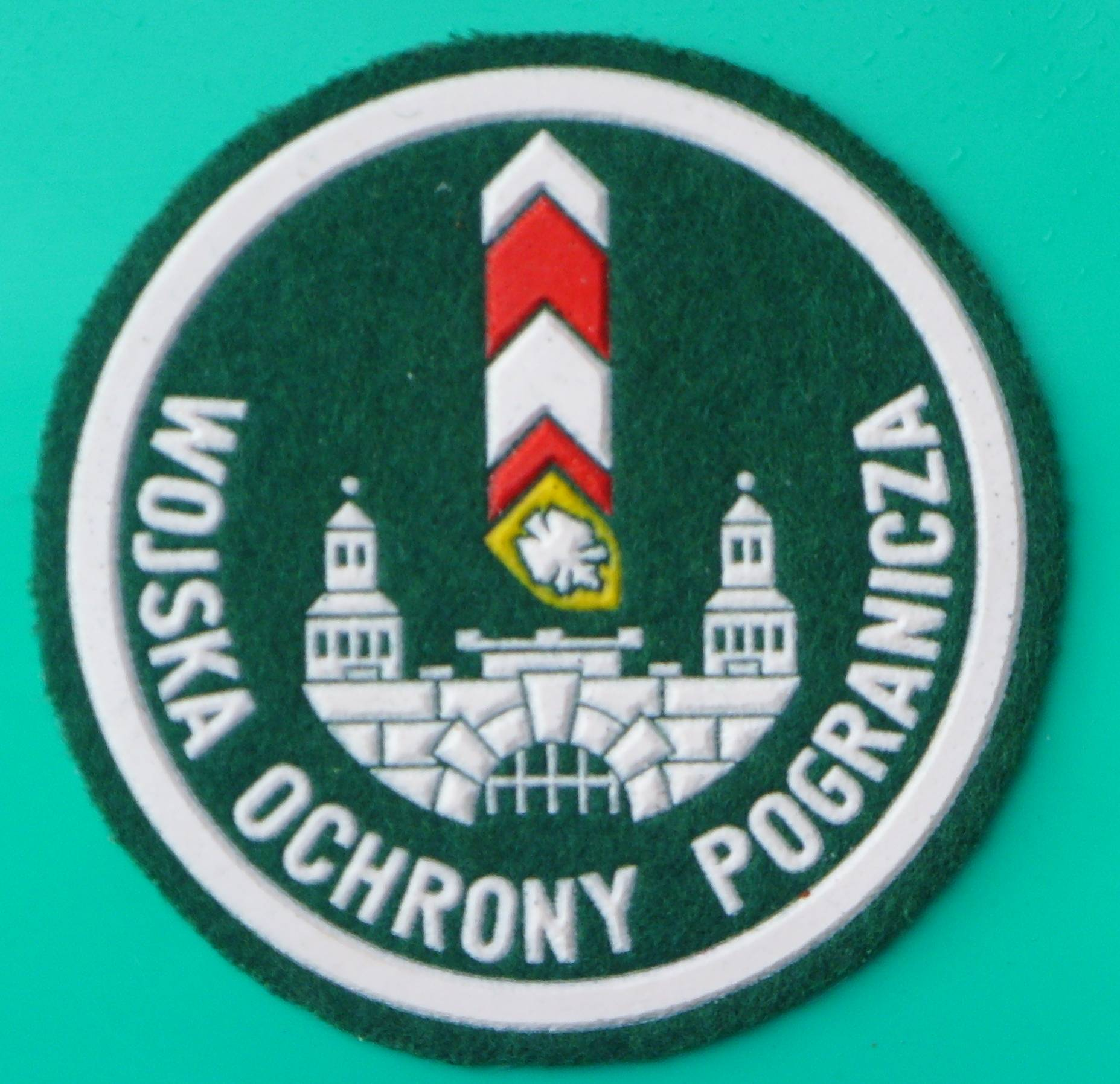 Naszywka Brygady WOP